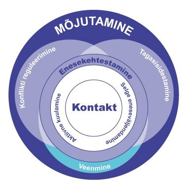 Suhtlemise kompleksoskuse- veenmise - seosed ja asukoht teiste suhtlusoskuste hulgas